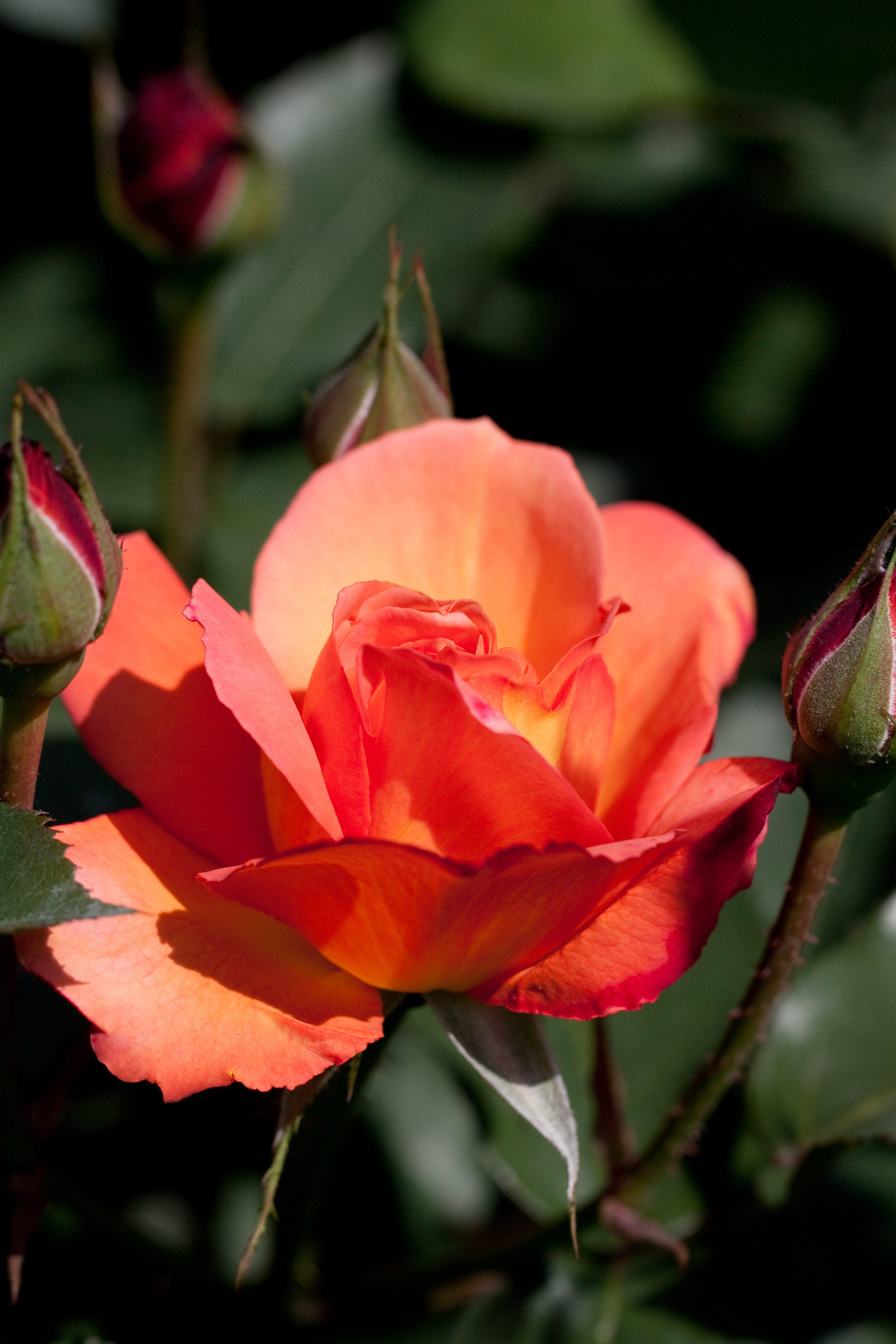 Souvenir 'd Anne Frank. スーヴニール・ド・アンネ・フランク。